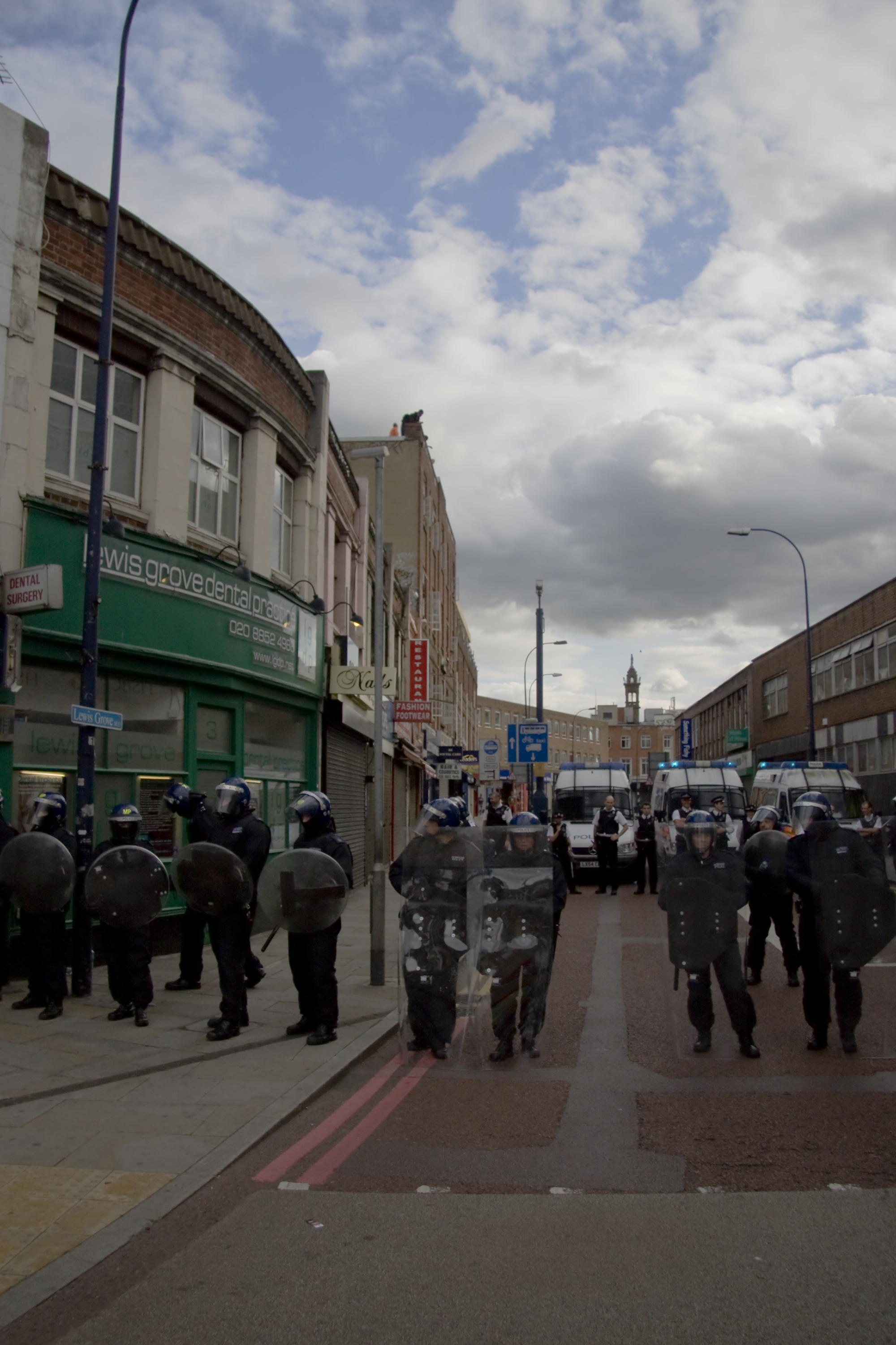 Lewisham